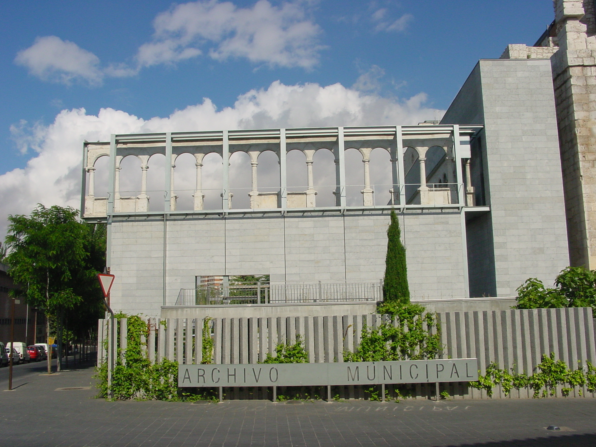 Archivo Municipal de Valladolid (España). Ubicado en la iglesia de San Agustín del antiguo convento de esta orden. En la foto puede verse la arquería del claustro recuperada y emplazada en la zona donde estuvo el claustro.